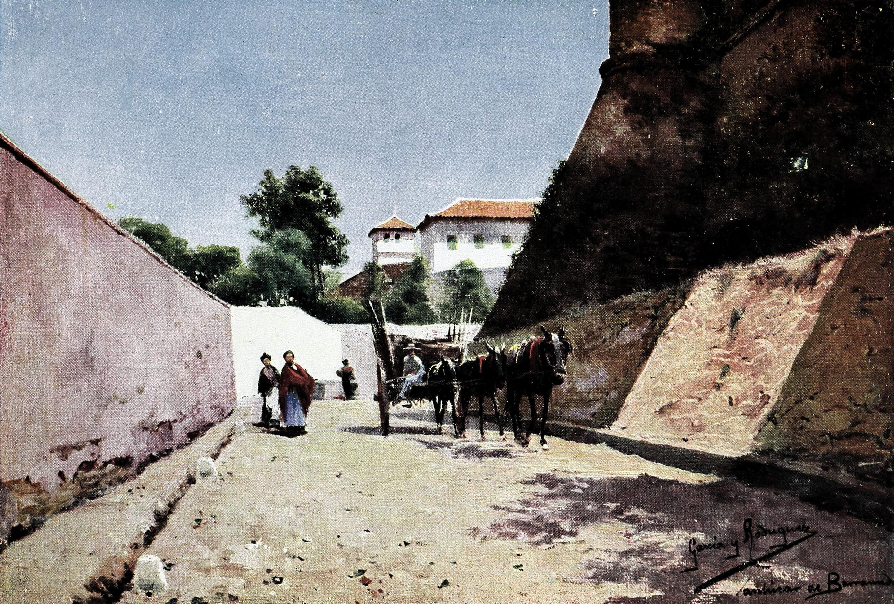 Sanlúcar de Barrameda.